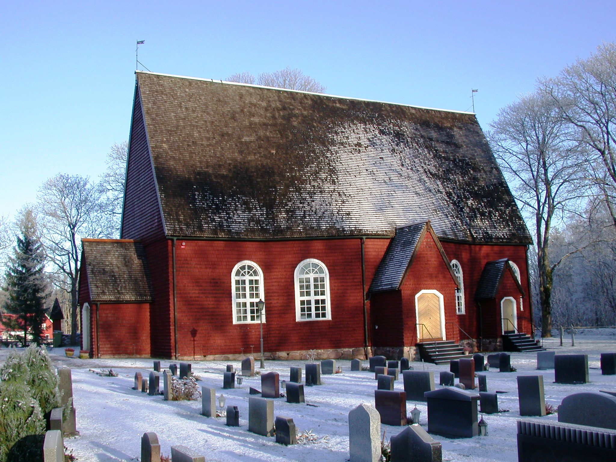 Kråksmåla church, Nybro, Sweden